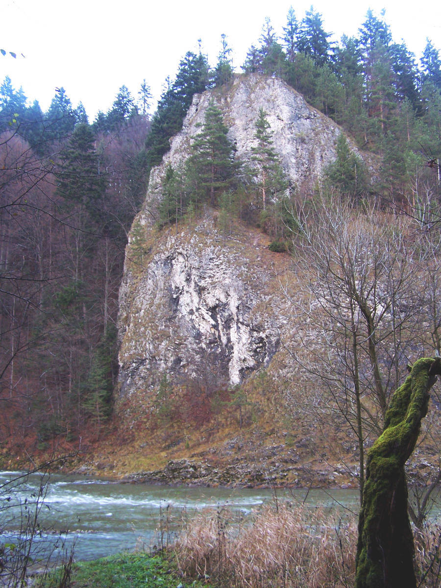 Hukowa Skała (Pieniny)